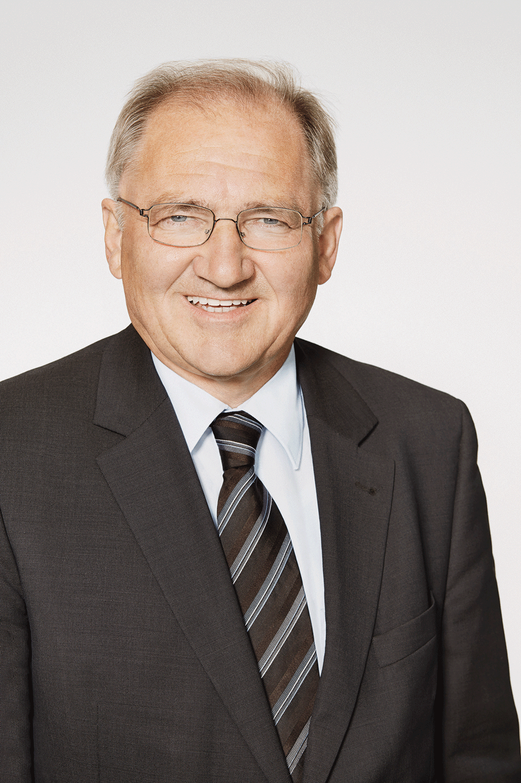 Peter Hofelich SPD Landtagsabgeordneter BW Depicted person: Peter Hofelich – German politician